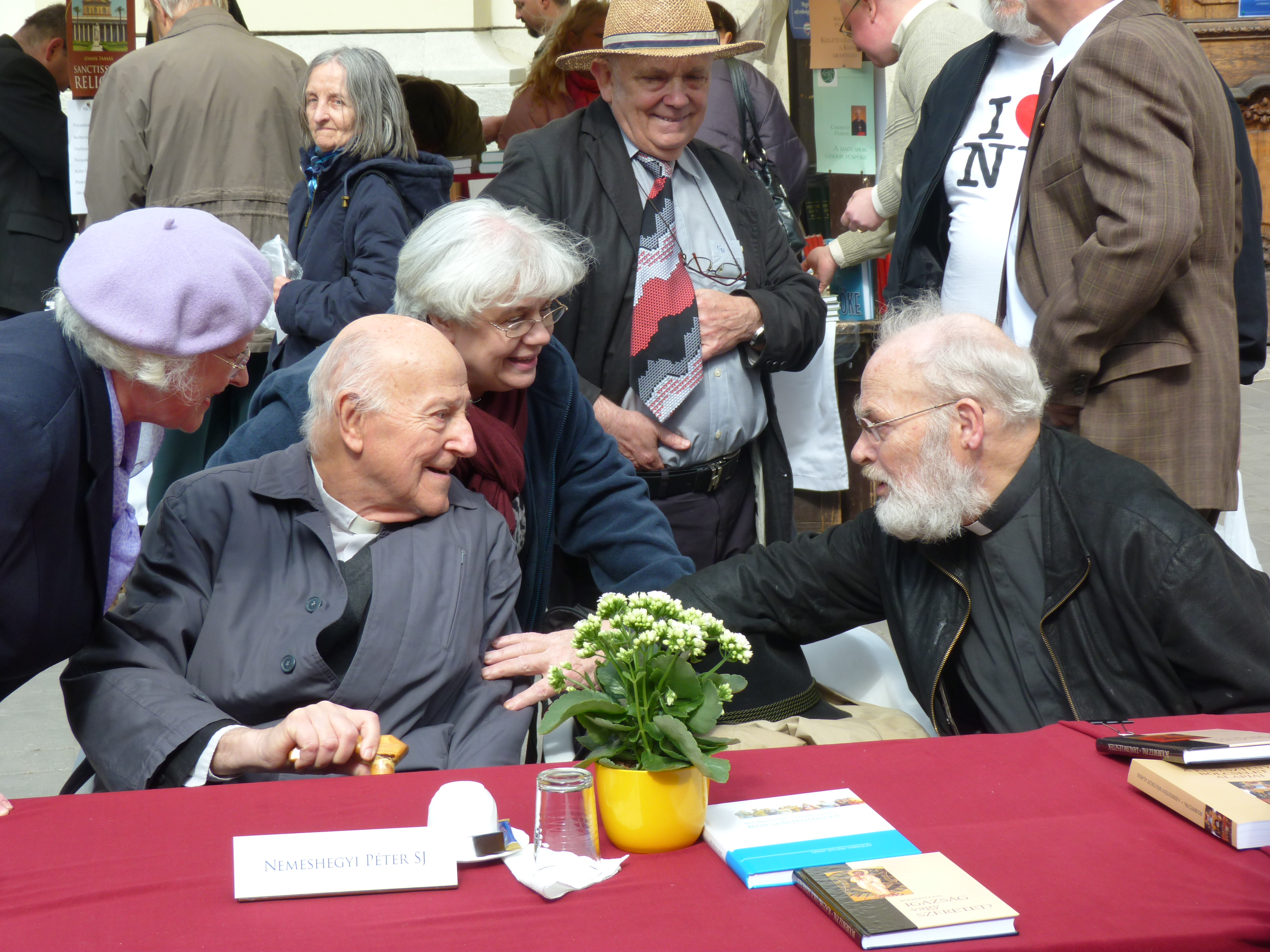 A felvétel 2012. május 17 –én, csütörtökön készült Budapesten, a Ferenciek terén (1-21). A XX. Szent István Könyvhetet 20. alkalommal rendezték meg. (PPKE), Nemeshegyi Péter. Forrás: Szent István Könyvhét huszadszor Metropol. A felvétel megjelent Creative Commons alatt a Metapolisz DVD sorozatban.